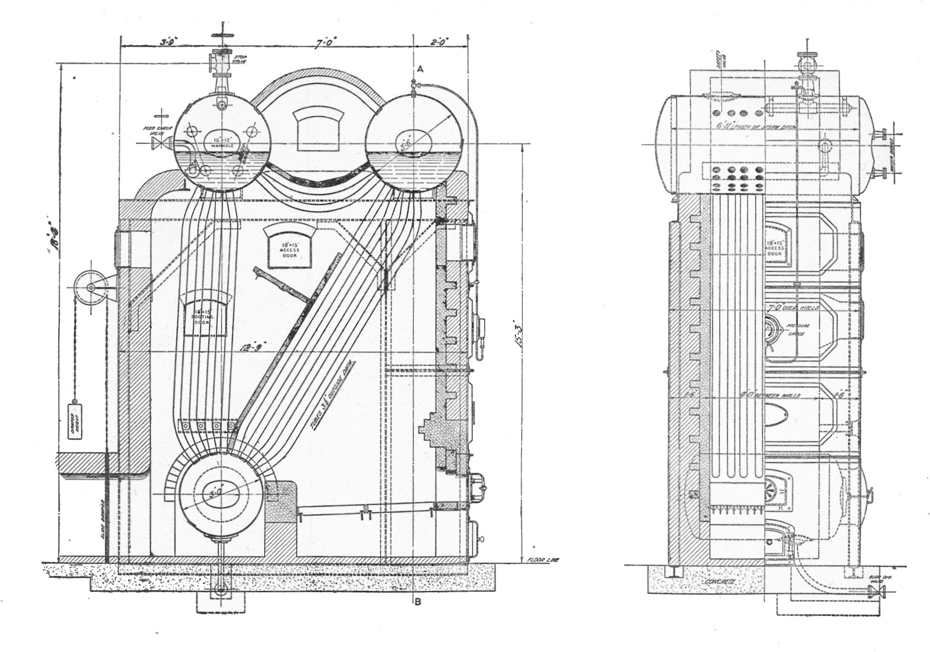 Stirling three-drum watertube boiler (Rankin Kennedy, Modern Engines, Vol VI).jpgFig. 67